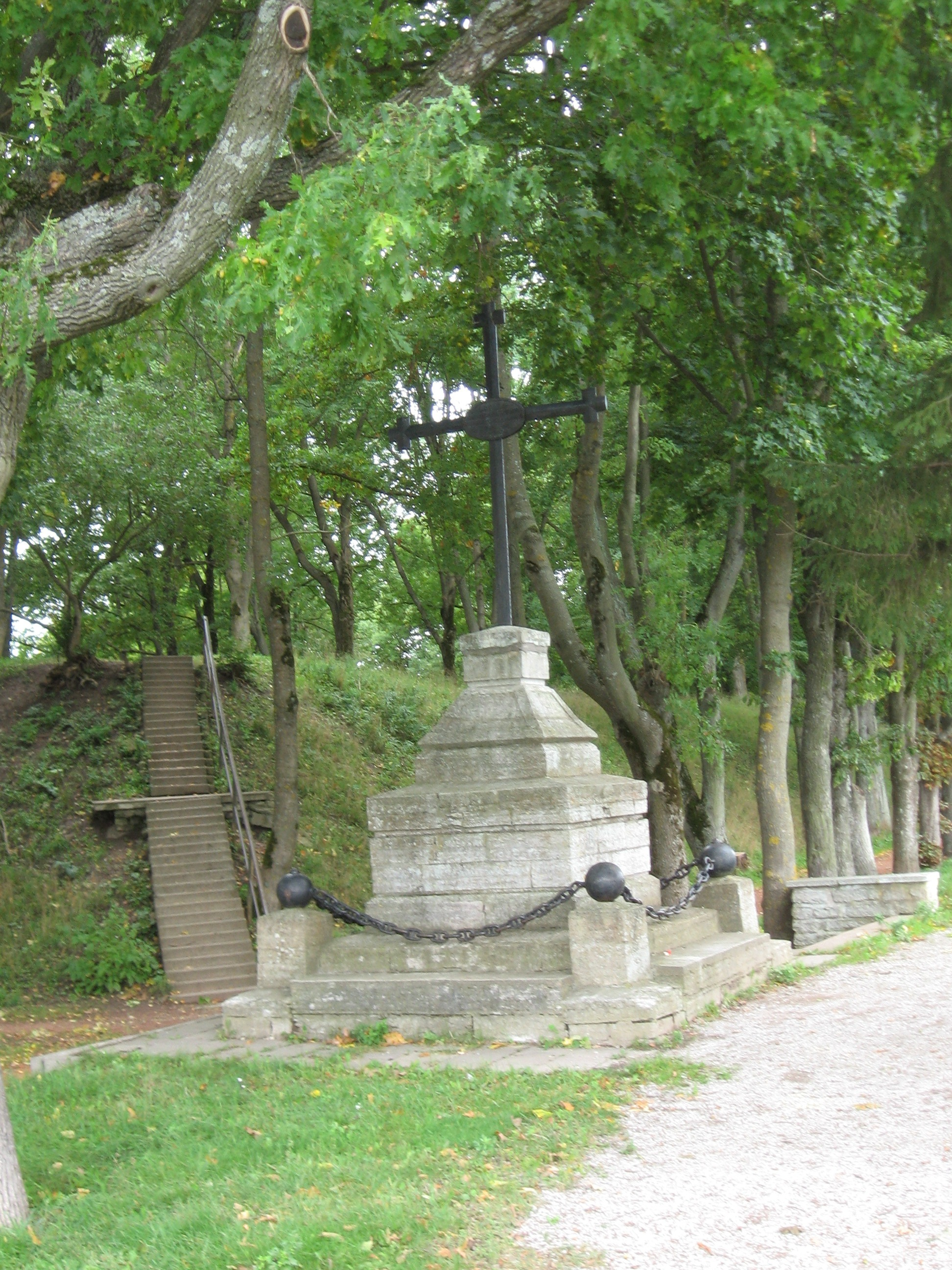 Monument Põhjasõjas langenud vene sõjaväelastele. Vaade lõunast.